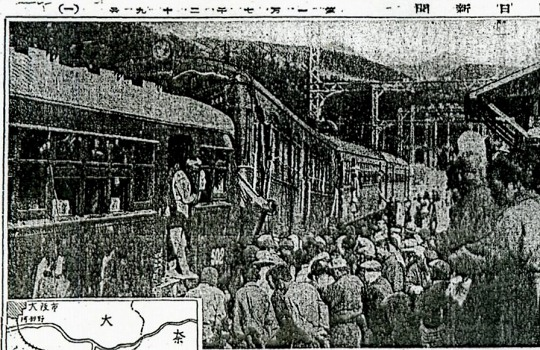 上ノ太子駅での三重衝突事故